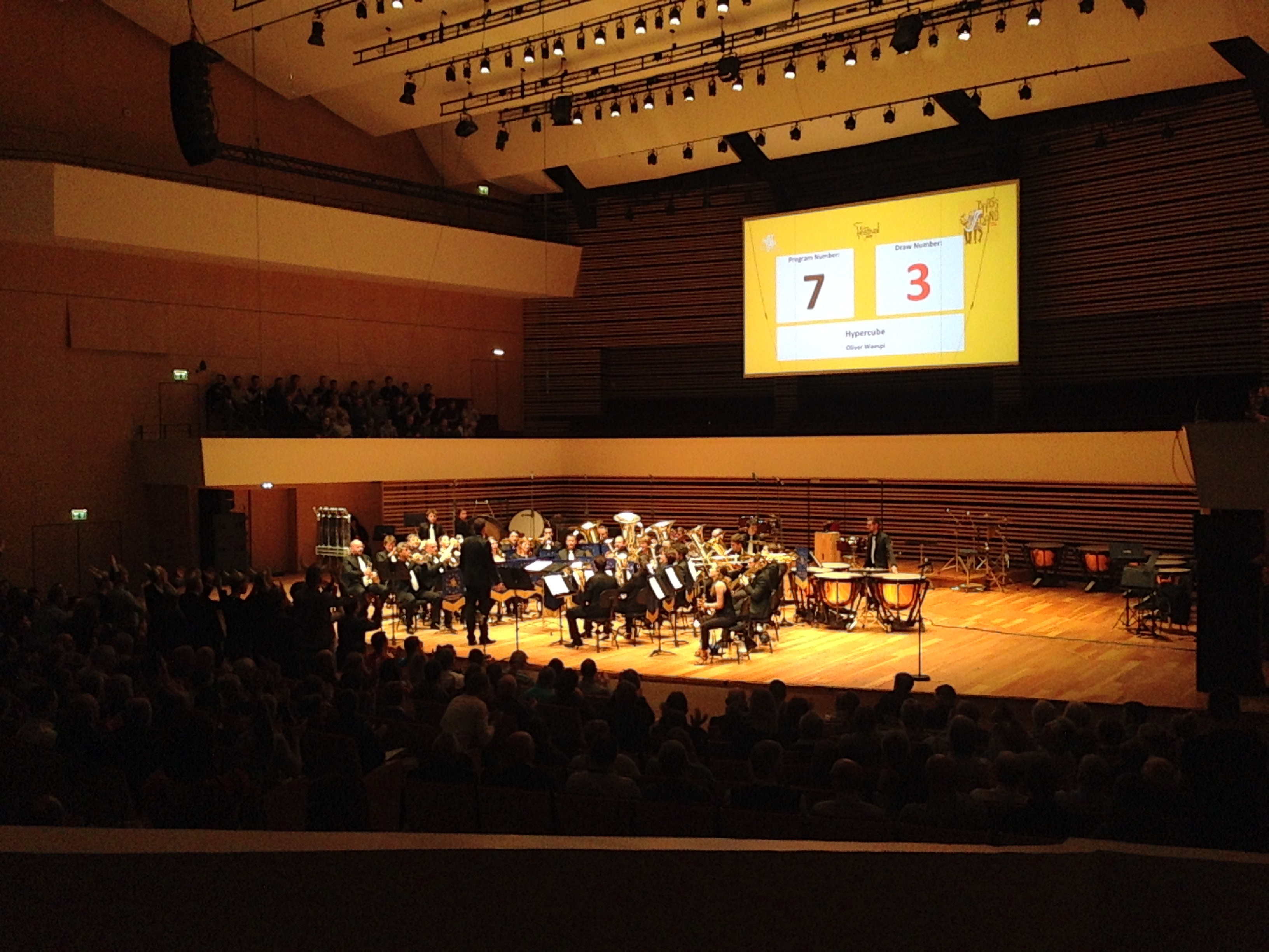 Paris Brass Band